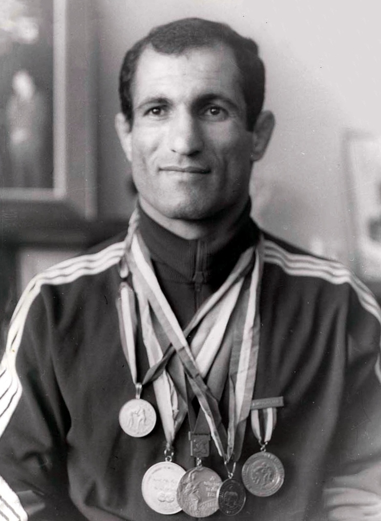 Abdollah Movahed